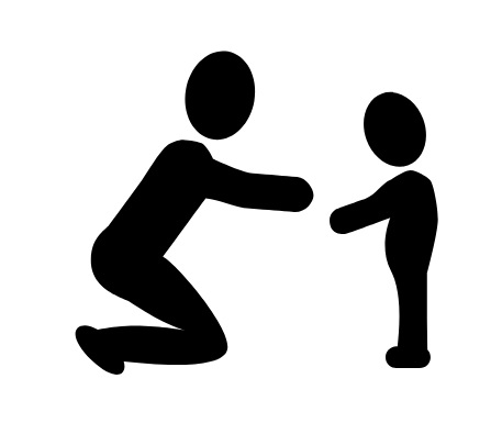 Niño de la mano de su tutor